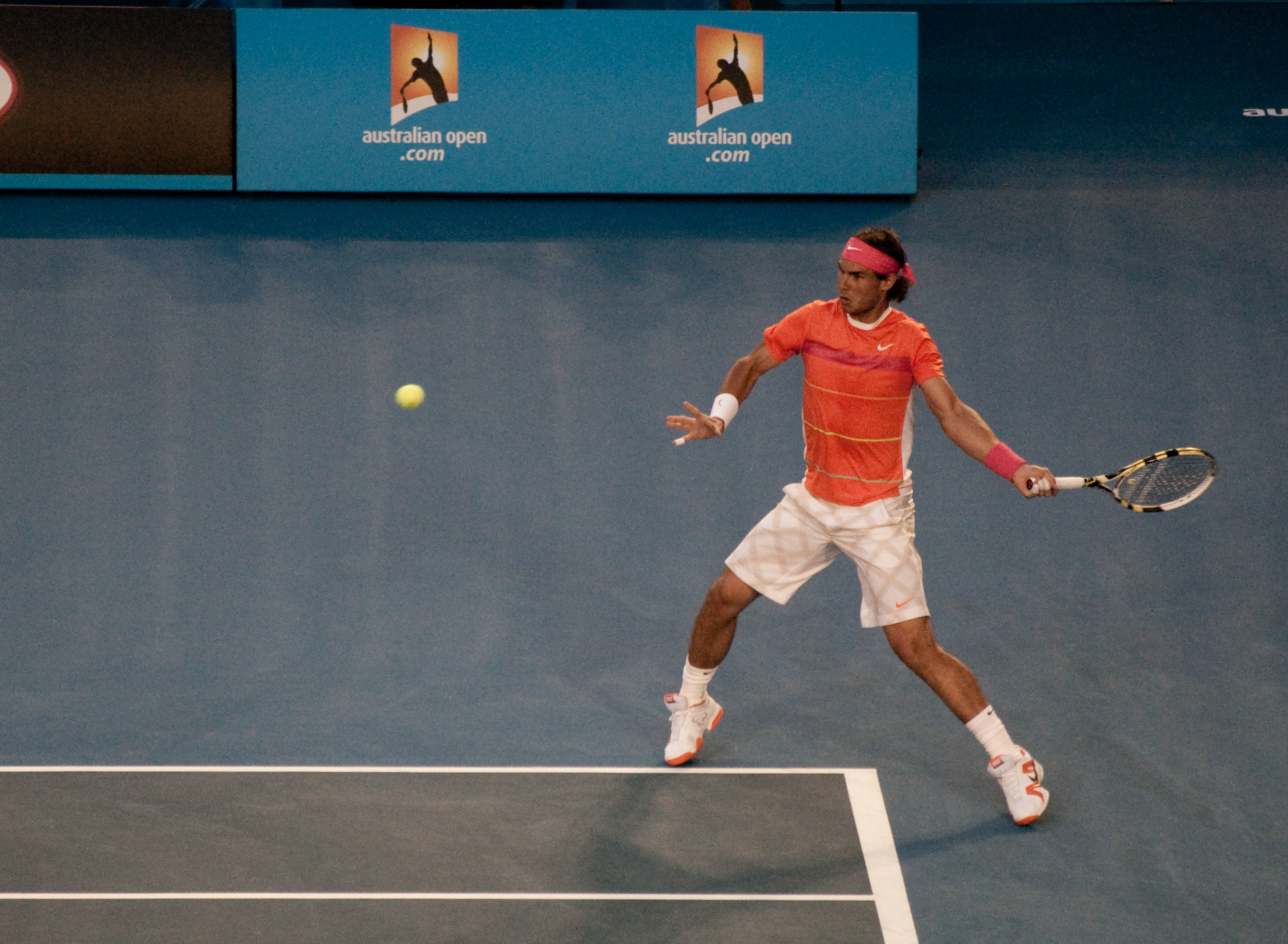 Australian Open 2010 Quarterfinals Nadal Vs Murray